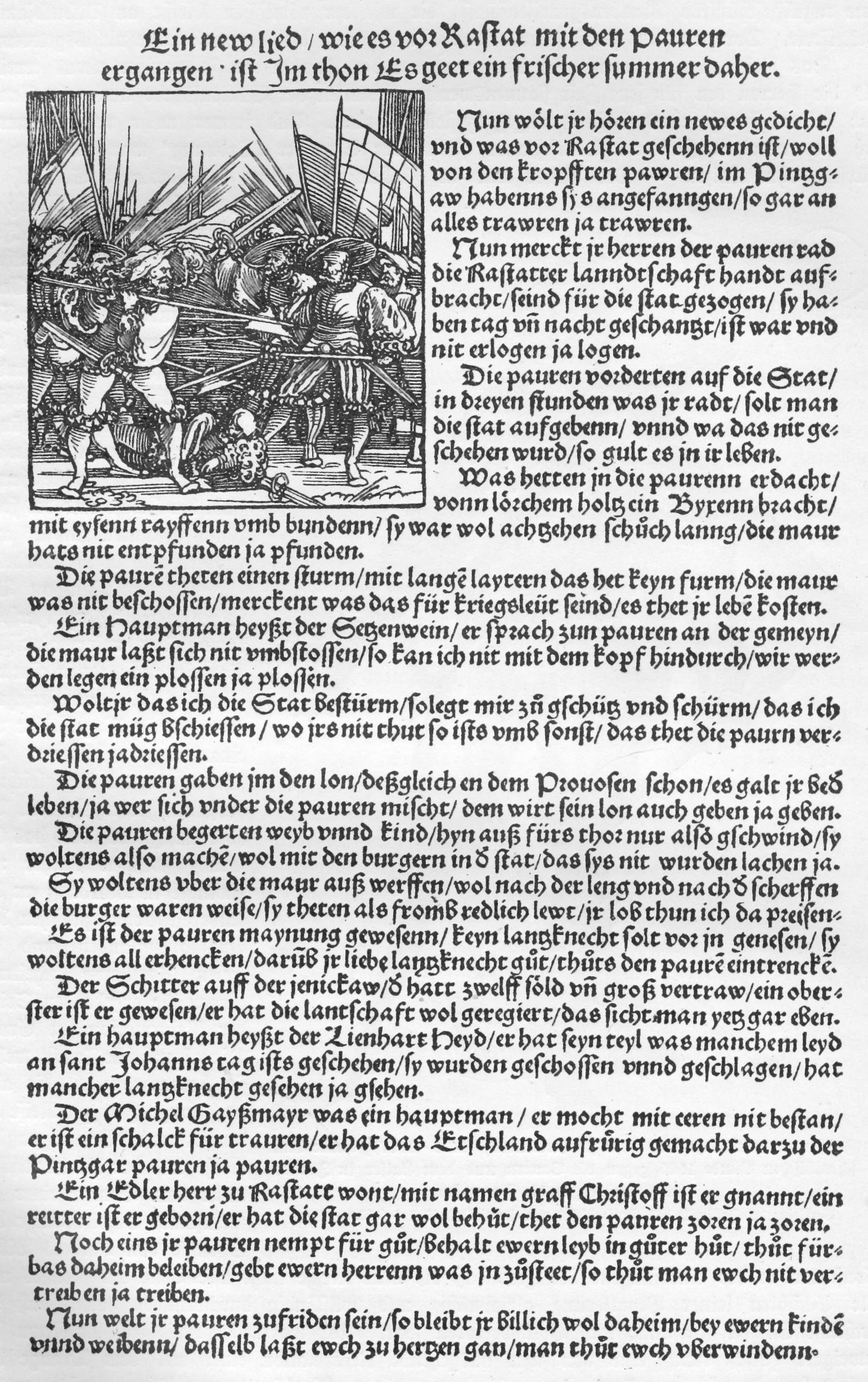 Flugblatt aus der Zeit des Bauernkrieges